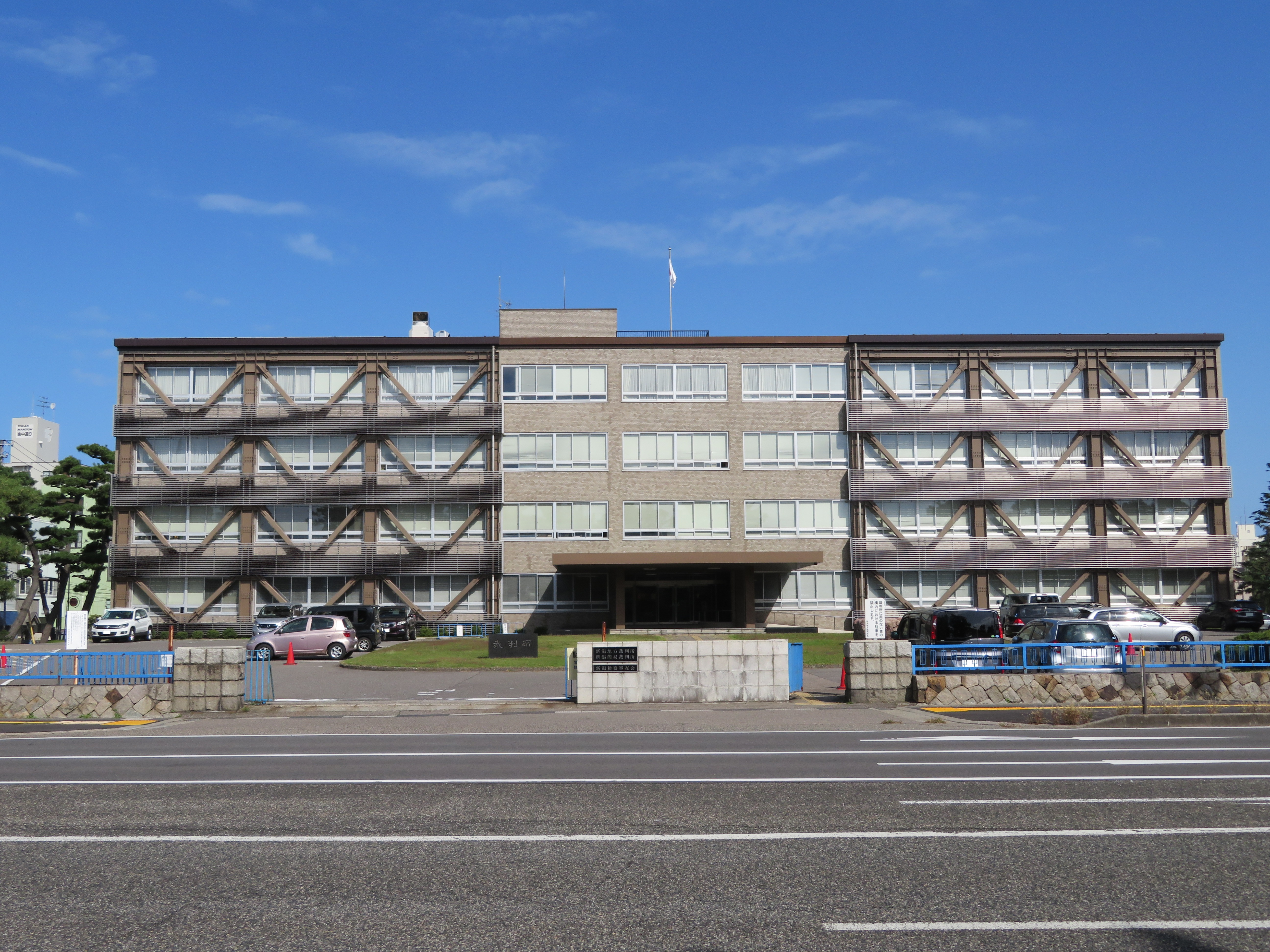 新潟地方裁判所庁舎 Canon PowerShot SX720 HS